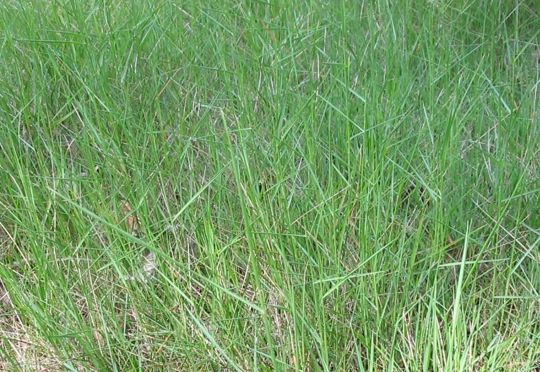 Fotografía realizada por Pablo Alberto Salguero Quiles. Ejemplares de unos 30 cm. mes de Abríl. En el Real Jardín Botánico de Madrid (España). Panterre dedicado a las gramineas. Ordo: Poales Familia: Poaceae Subfamilia: Pooideae Tribus: Brachypodieae Genus: Brachypodium Species: Brachypodium phoenicoides